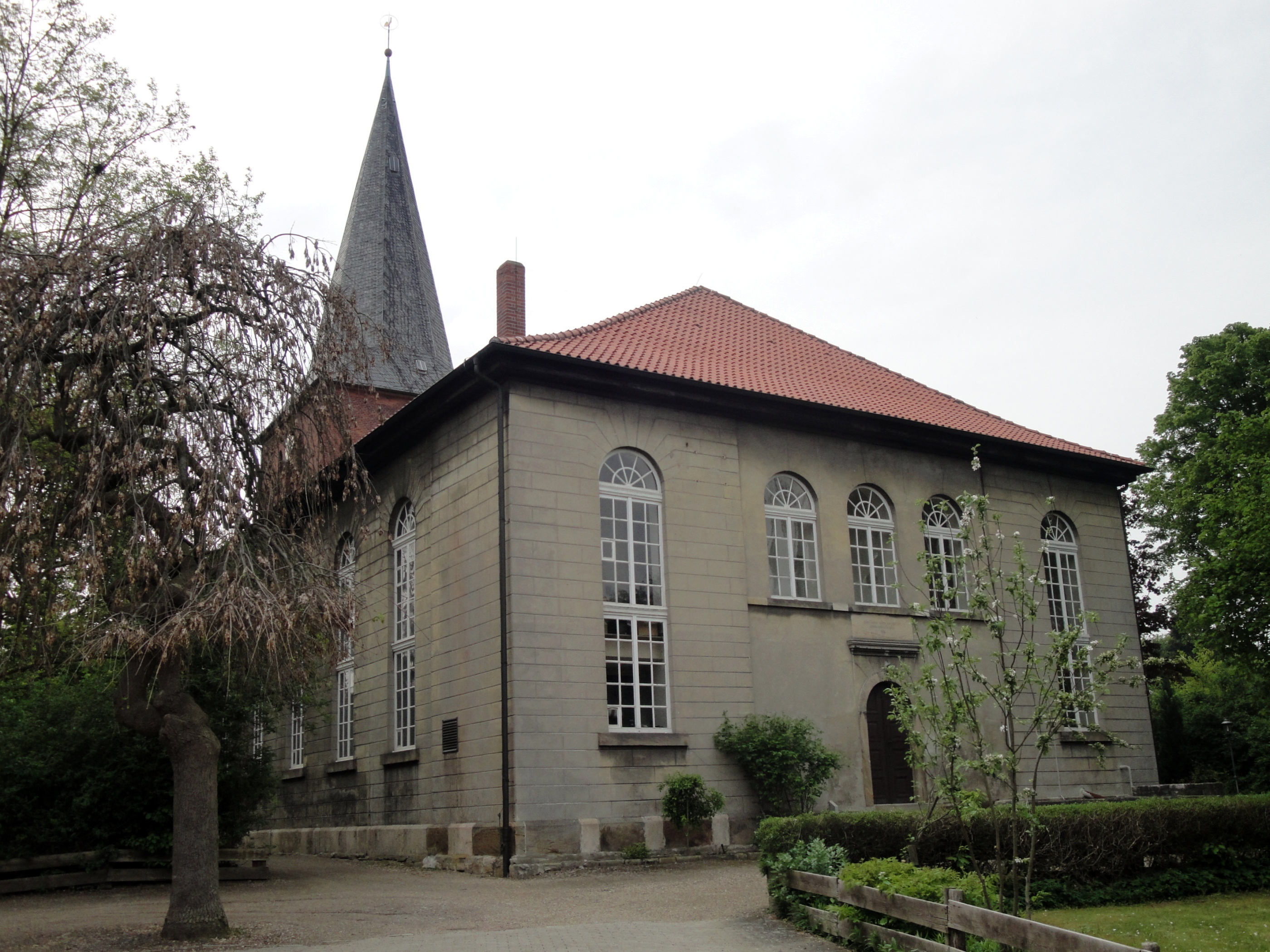 Stephanikirche in Meine